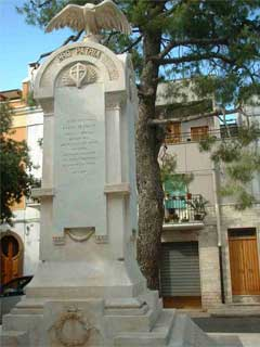 Il Monumento Ai Caduti della Prima e della Seconda Guerra Mondiale di Pezze di Greco. La foto è stata scattata e pubblicata dall'utente Micettonero.